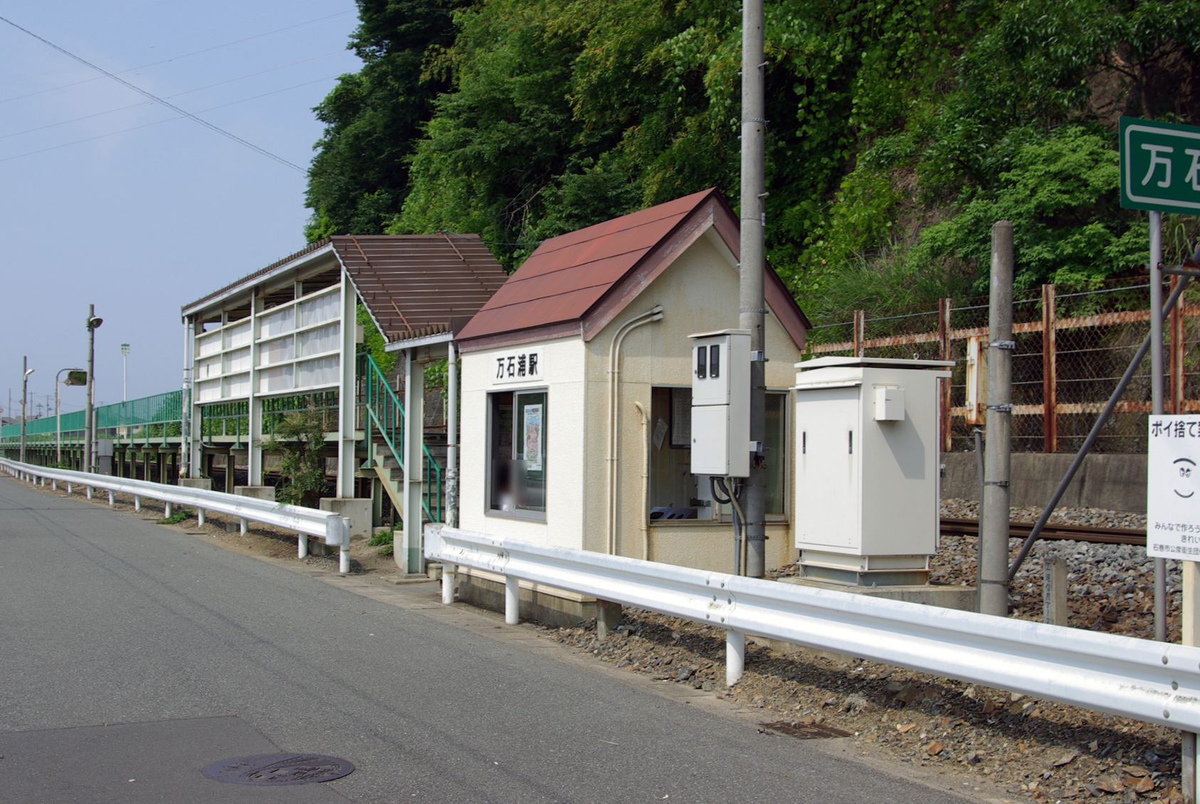 JR石巻線万石浦駅